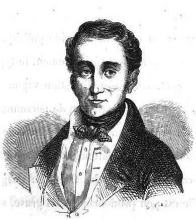 De Broglie